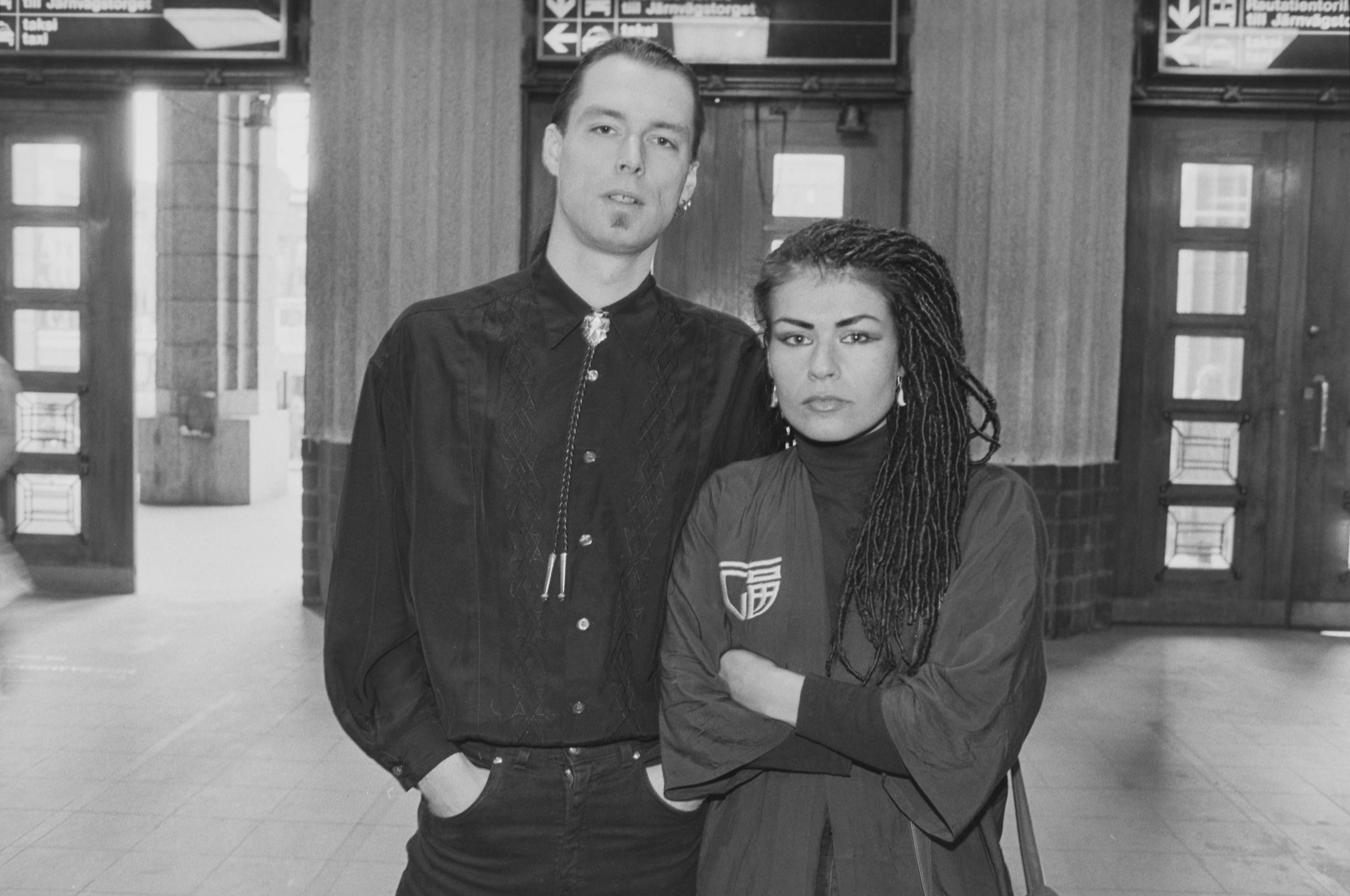 Honey B. & T-Bonesin Esa Kuloniemi ja Aija Puurtinen Helsingin Rautatieasemalla.